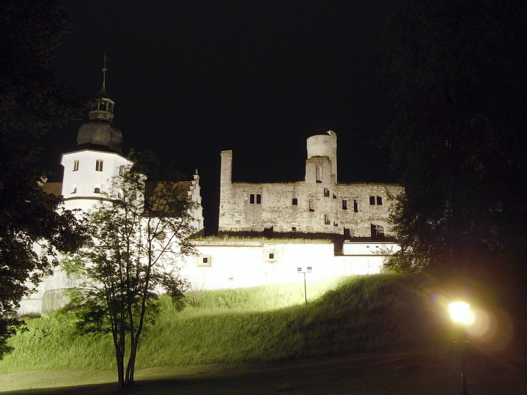 Castle Hellenstein at night